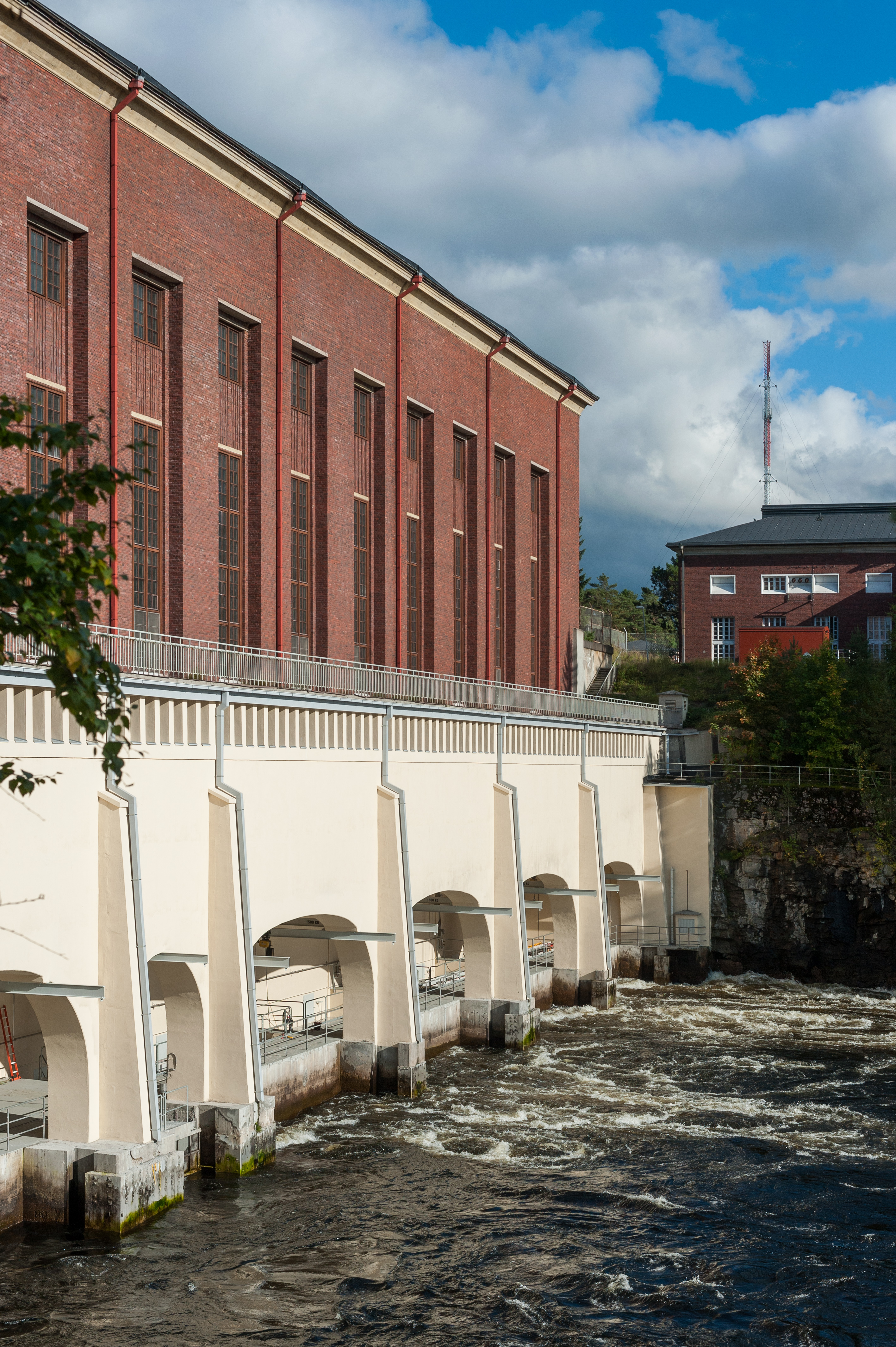 Imatrankosken vesivoimala